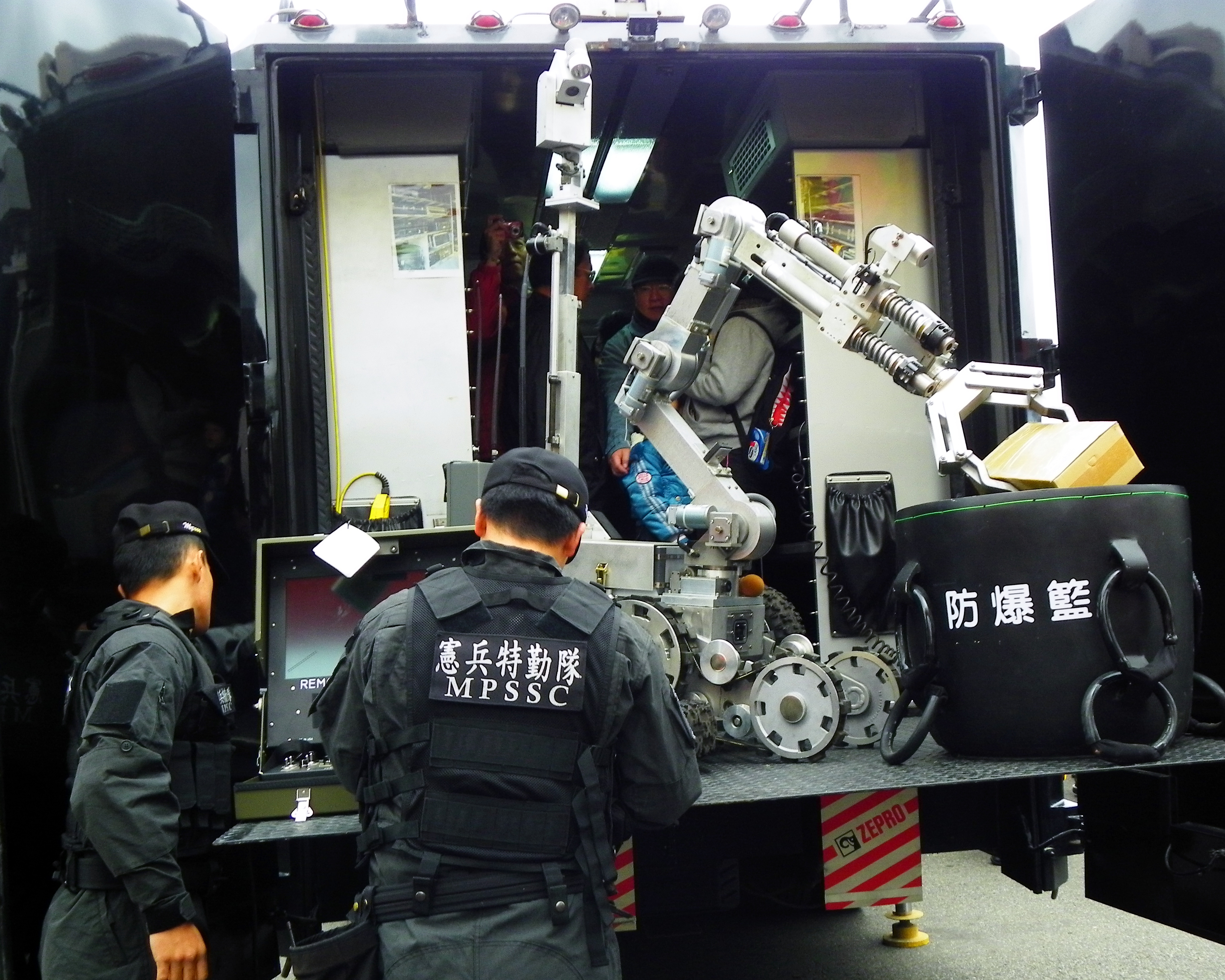 憲兵特勤隊操作搭載於重裝備車的防爆機械人。